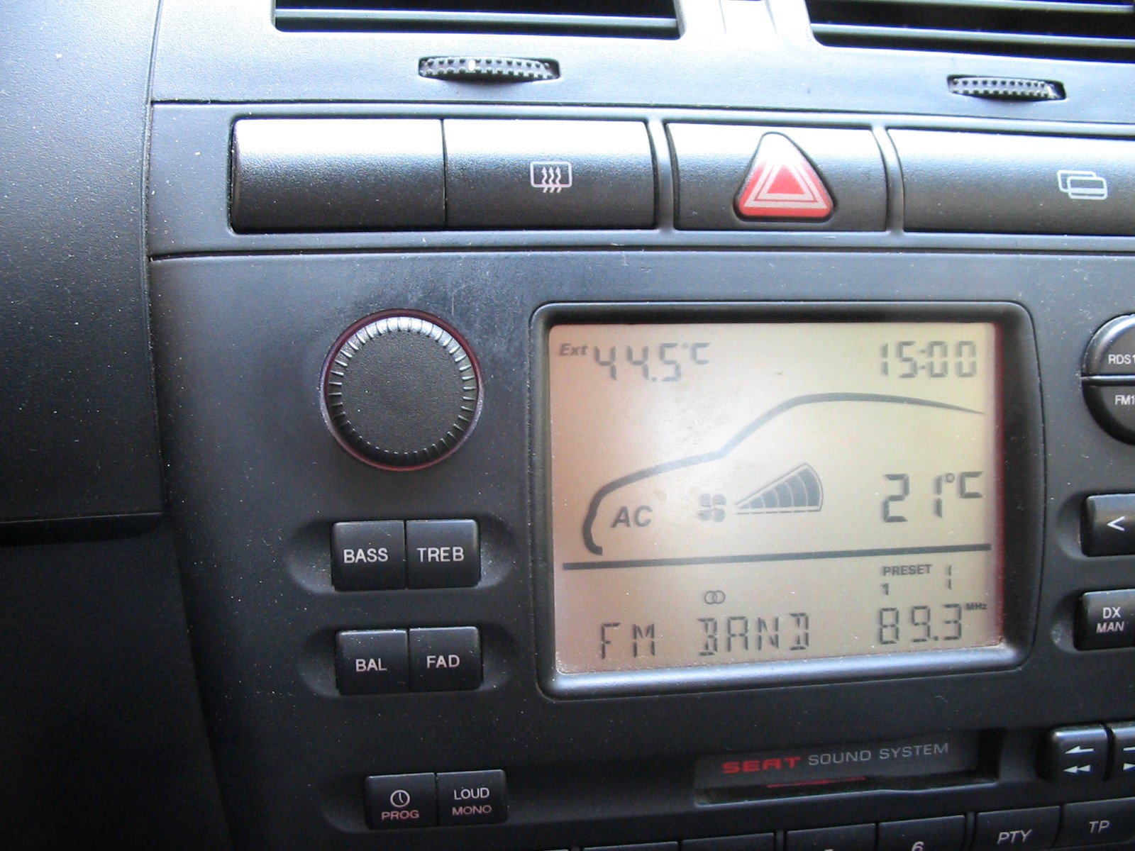 termómetro de día